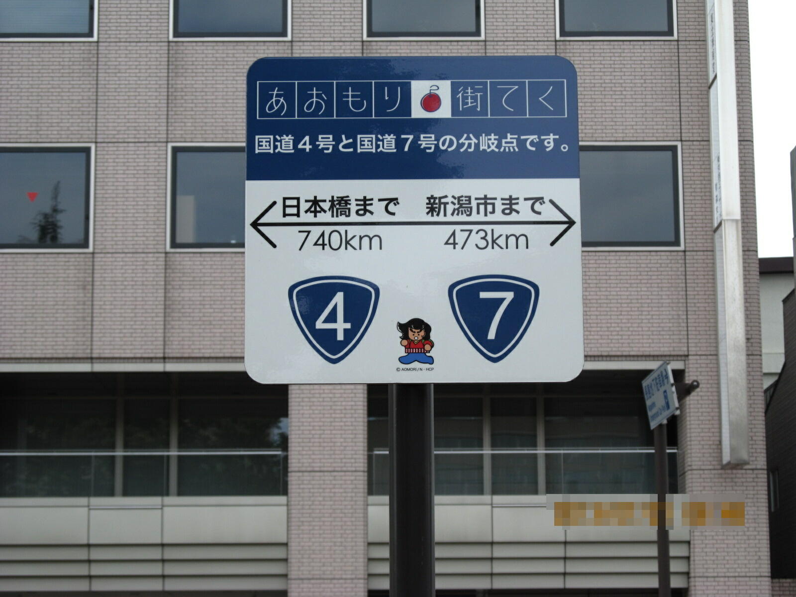 国道4号と国道7号の分岐点（青森市長島）。ここより東（向かって左）が国道4号（東京方）、ここより西（向かって右）が国道7号（新潟方）である。